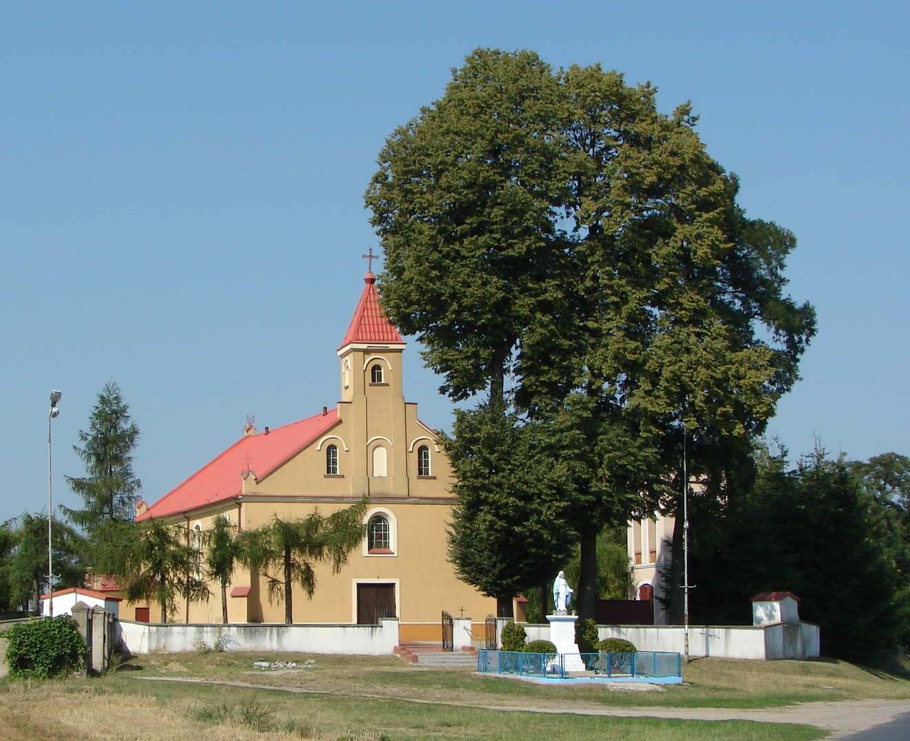 Stara Sobótka, kościół par. pw. św. Mateusza, ok. 1879